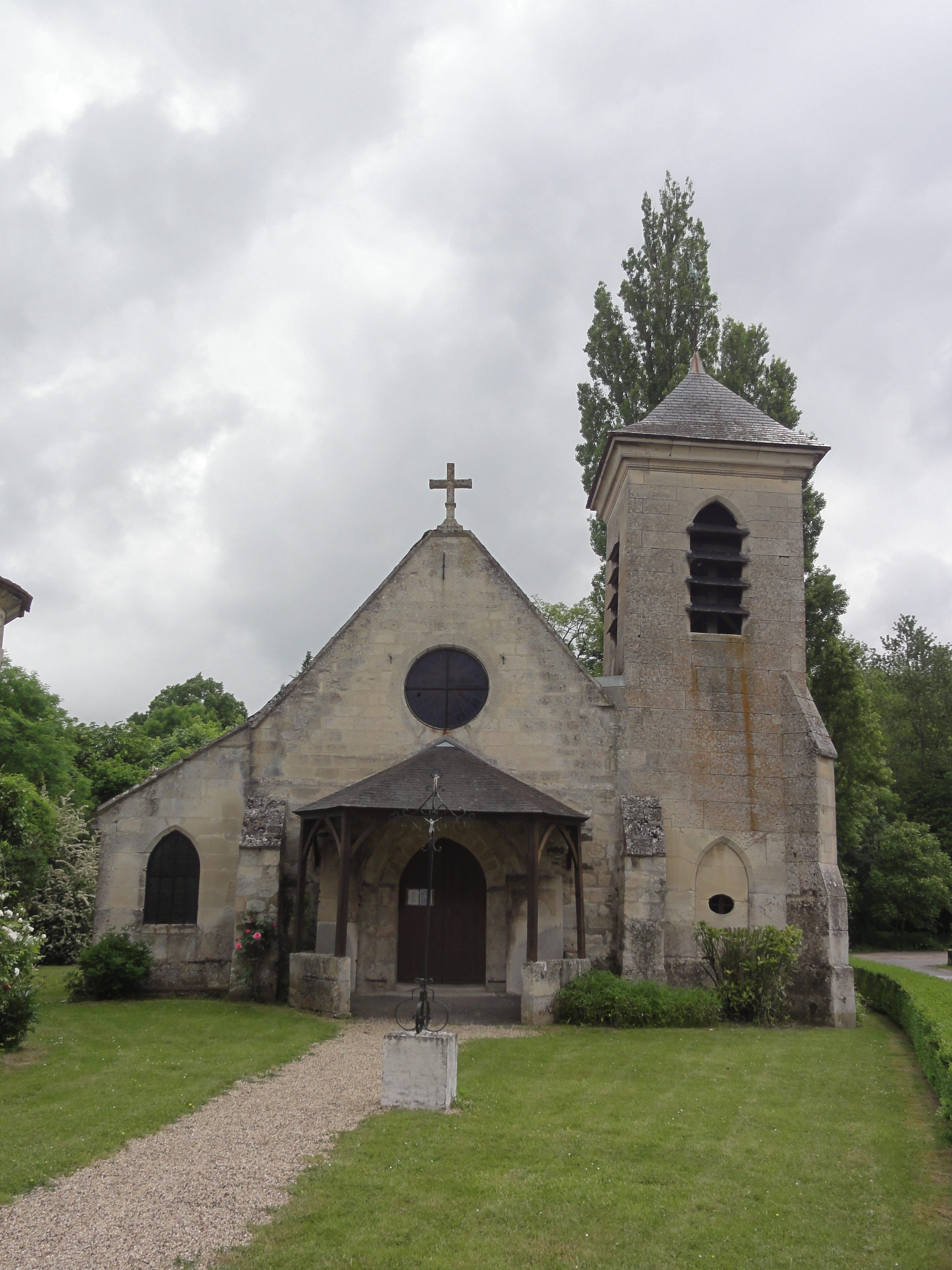 Bazicourt (Oise) Église